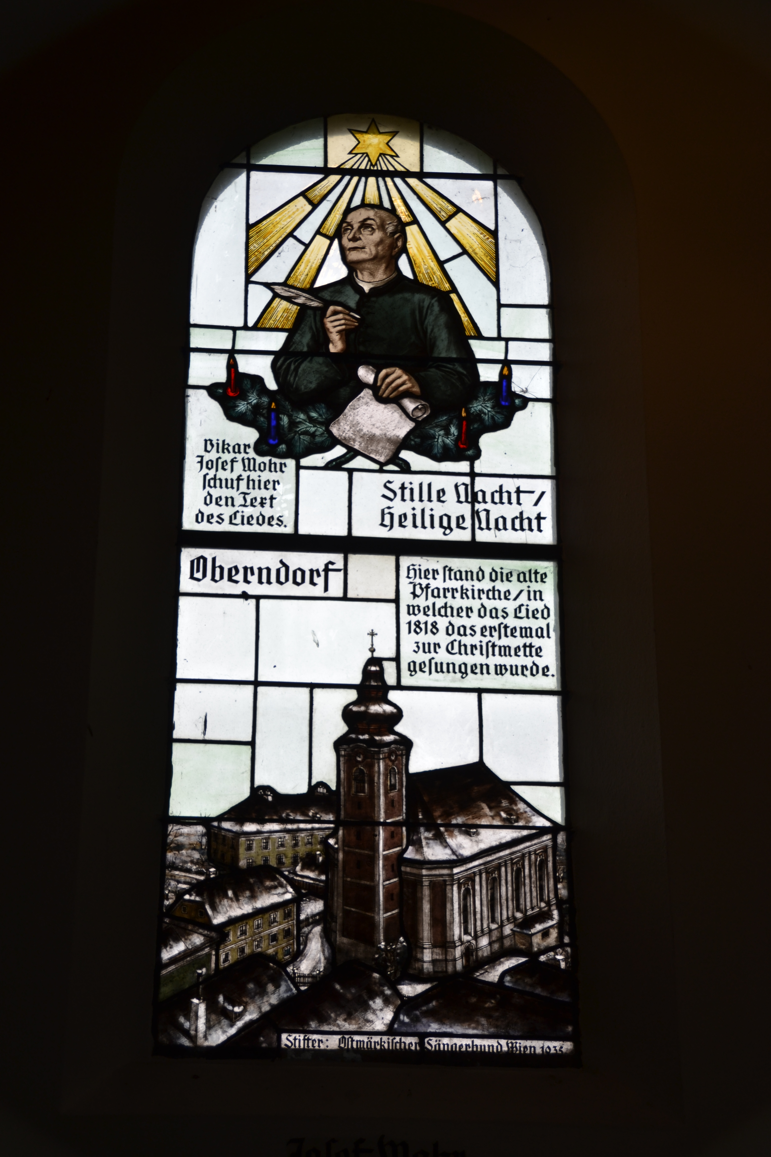 Die Stille-Nacht-Kapelle Oberndorf bei Salzburg.